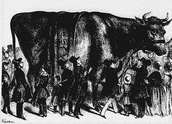 Caricature de Clément Pruche figurant le Bœuf Gras du Carnaval de Paris. Légende du dessin : "Quelle prodigieuse bête !!! Si nous pouvions être un jour de cette force-là !!"